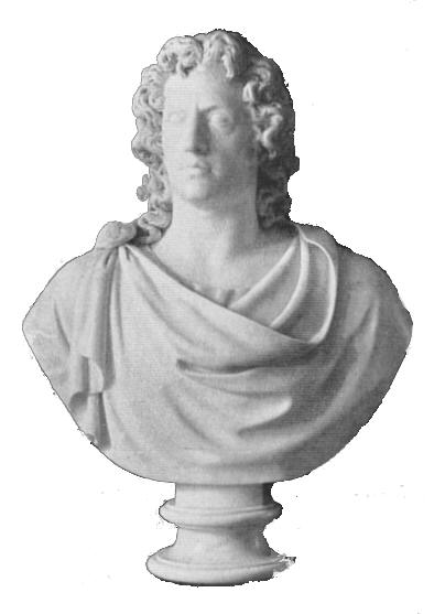 Goethe Marmorbüste von Trippel 1787. Exermplar der Landesbibliothek in Weimar. Goethe war im ganzen mit der Arbeit zufrieden; er habe nichts dagegen, daß die Nachwelt glaube, er habe so ausgesehen.